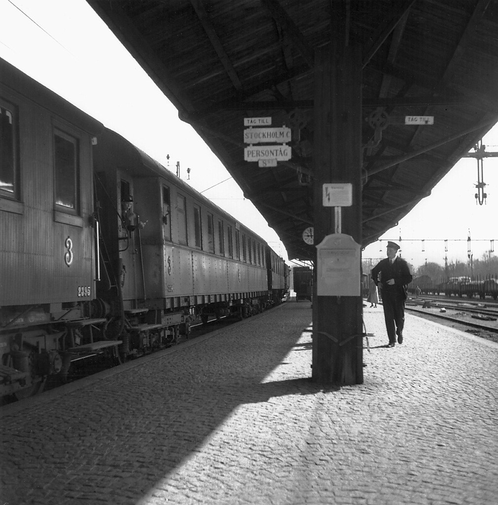 A train at the railway station in Nyköping. A stationmaster or guard is walking on the platform. Ett tåg vid järnvägsstationen i Nyköping. En stins eller konduktör går på perrongen. Parish (socken): Nyköping Province (landskap): Södermanland Municipality (kommun): Nyköping County (län): Södermanland Photograph by: Mårten Sjöbeck Date: 1939 Format: Film Persistent URL: Read more about the photo database (in english)